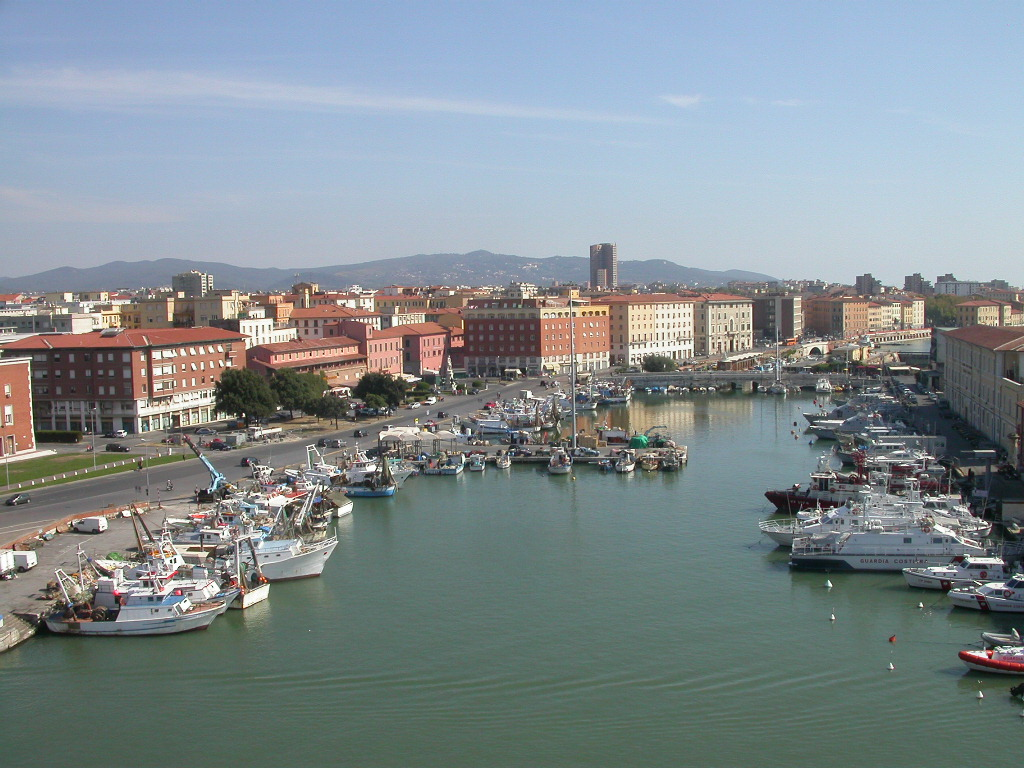 Livorno, Toscana, ItaliaDSCN7051